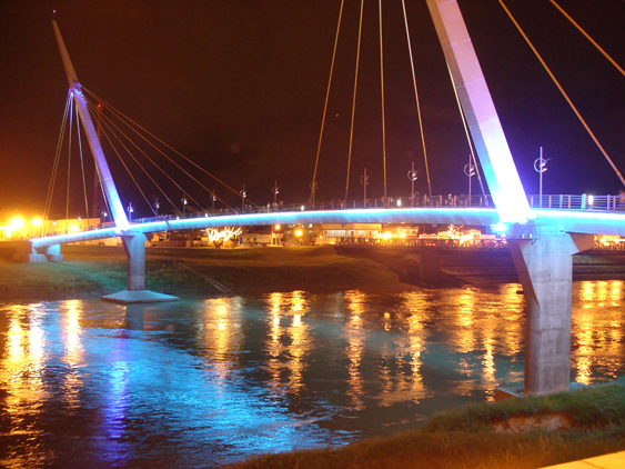 Foto tirada por mim, Davi Sopchaki, da passarela Joaquim Macedo, em Rio Branco